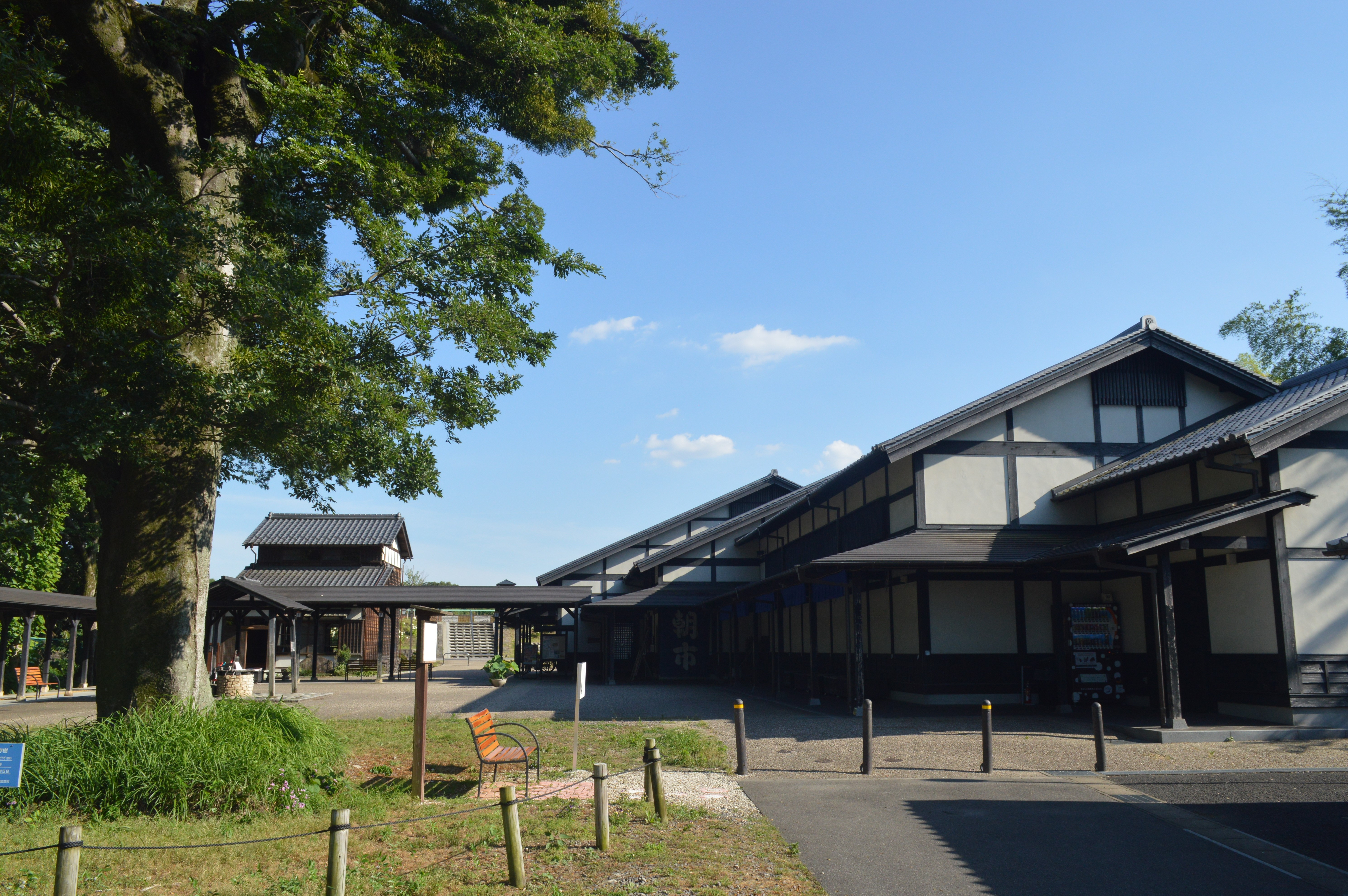 岐阜県美濃加茂市にある太田宿中山道会館。